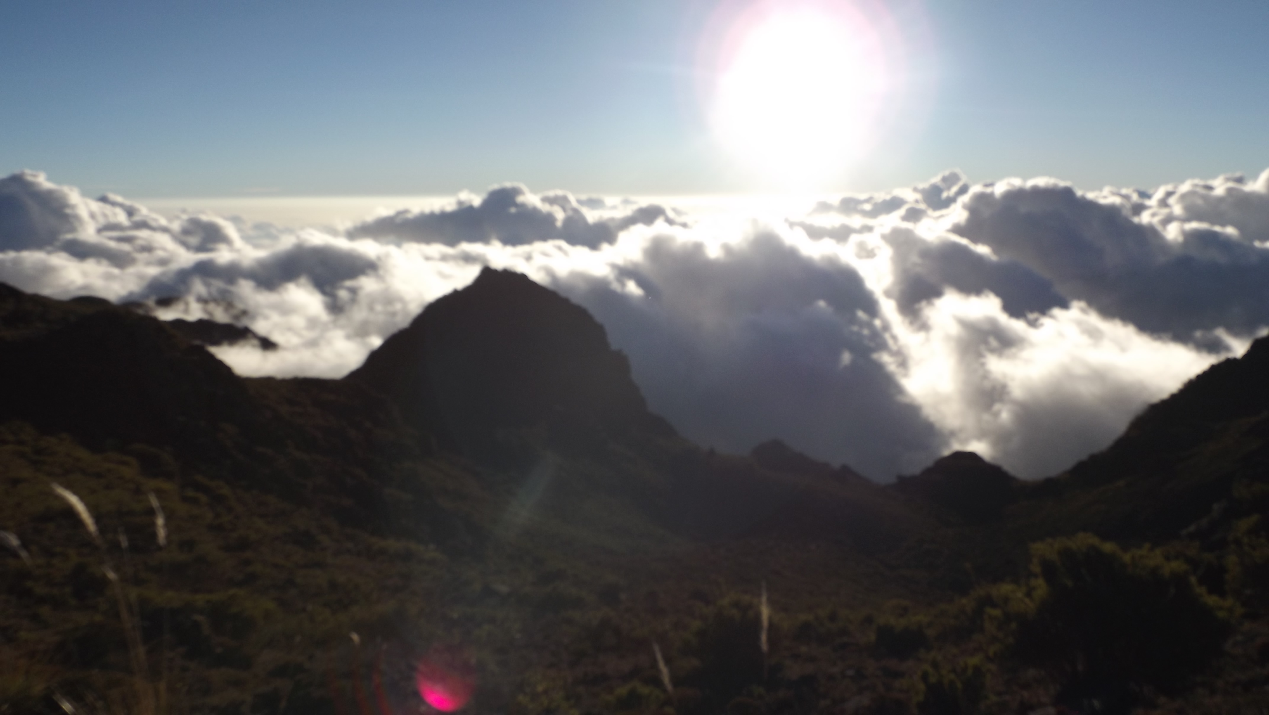 Cerro Ventisqueros Minutos antes del atardecer